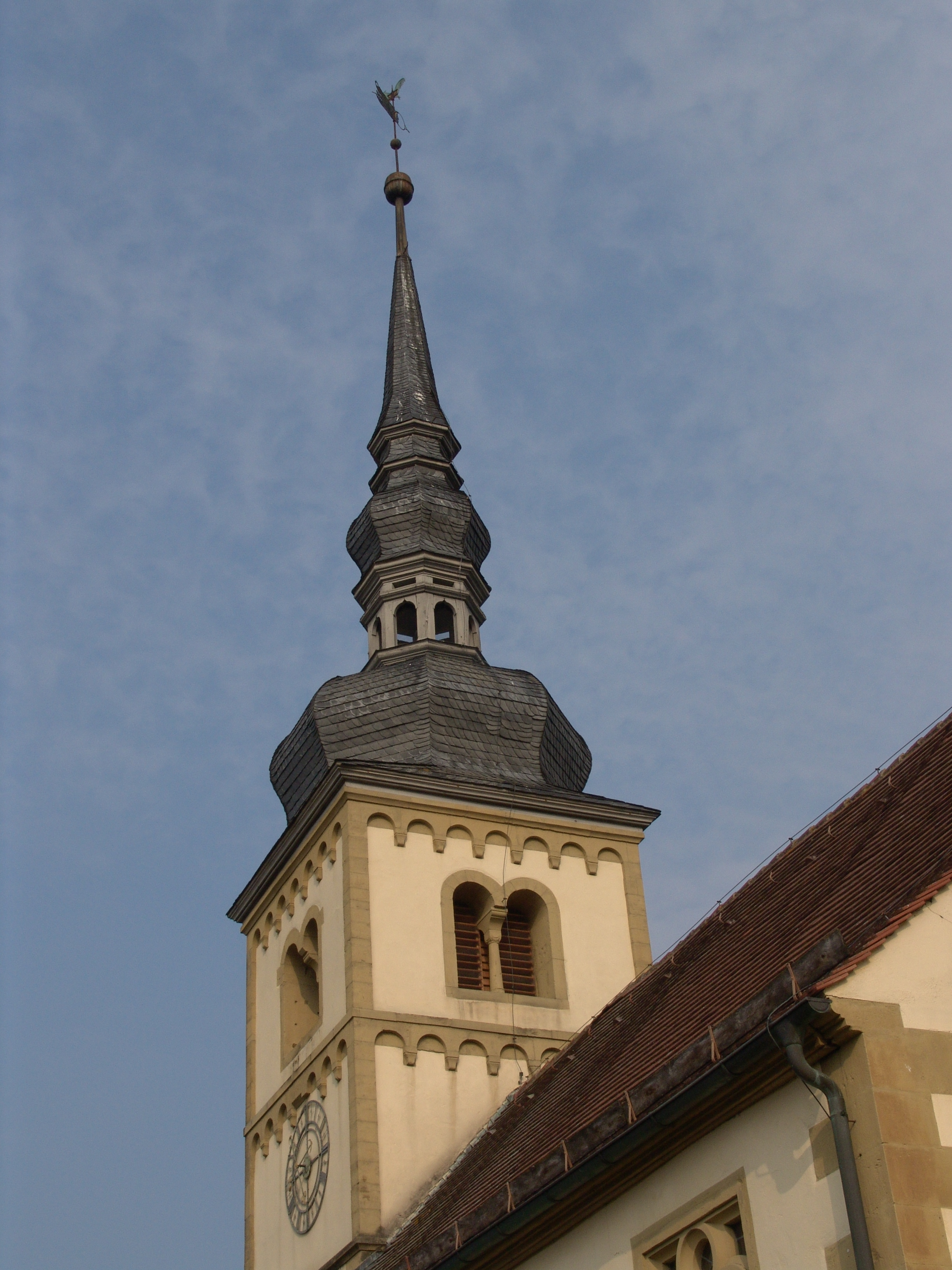 evang.-luth. Kirche St. Johannes in Gnötzheim